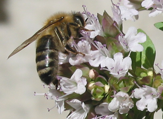 Biene an Majoran